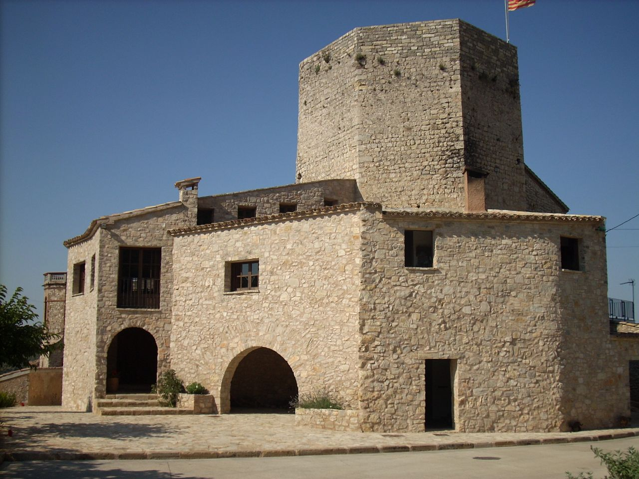 Castell d'Orpí (Anoia), amb la seva torre poligonal